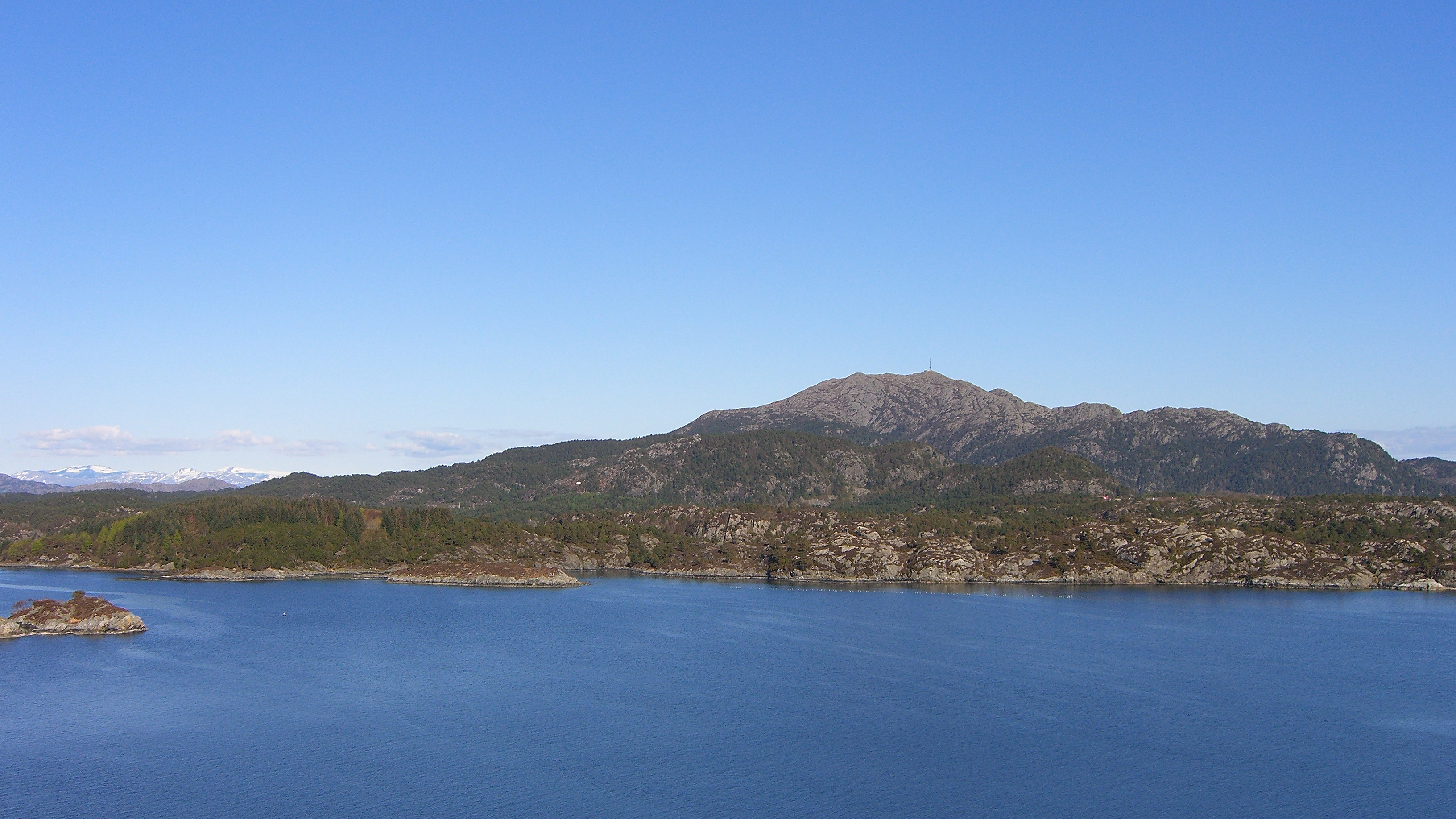 Siggjo in Bømlo, Hordaland